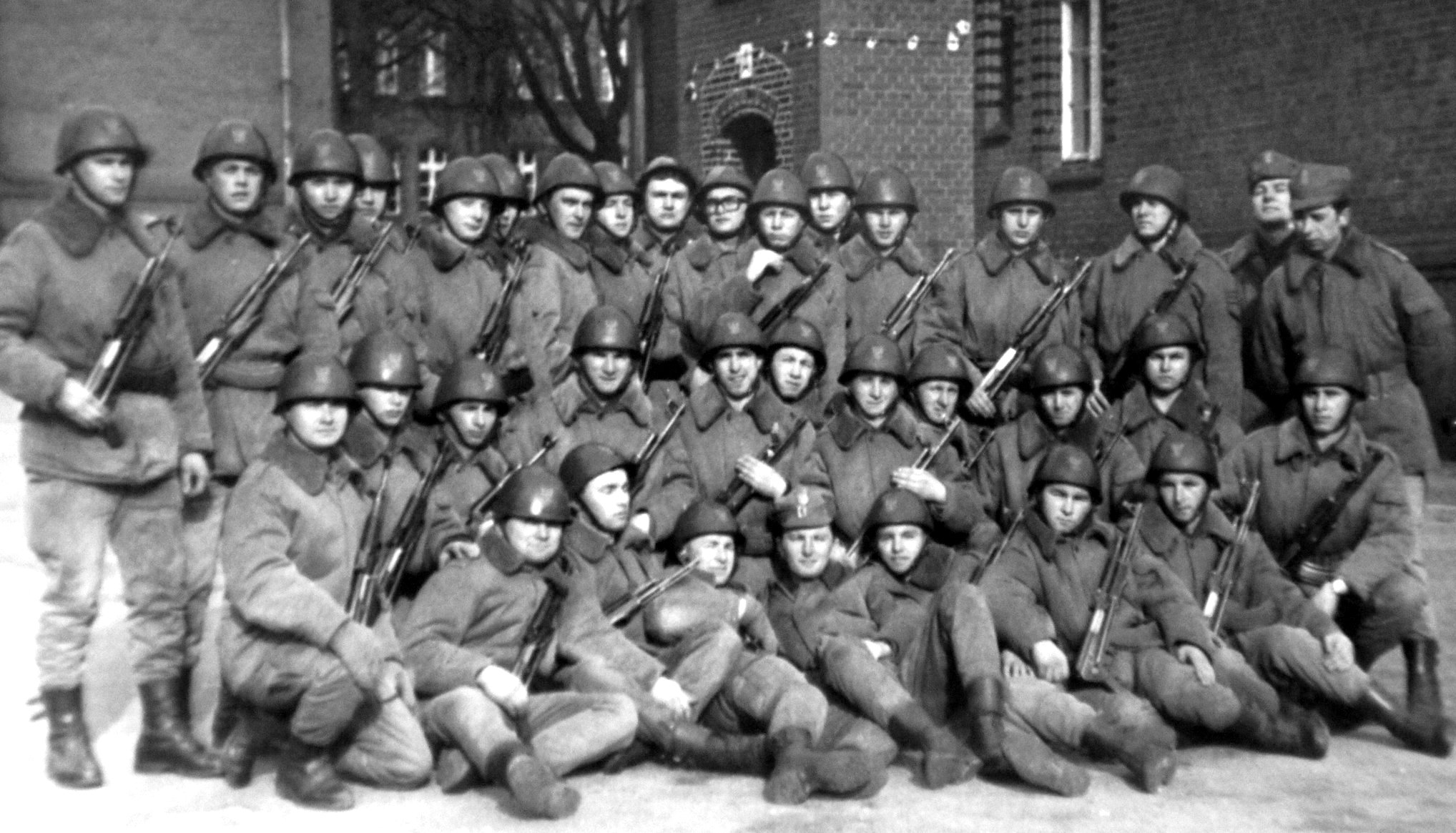 Pluton żołnierzy - Ośrodek Szkolenia Górnośląskiej Brygady WOP w Prudniku